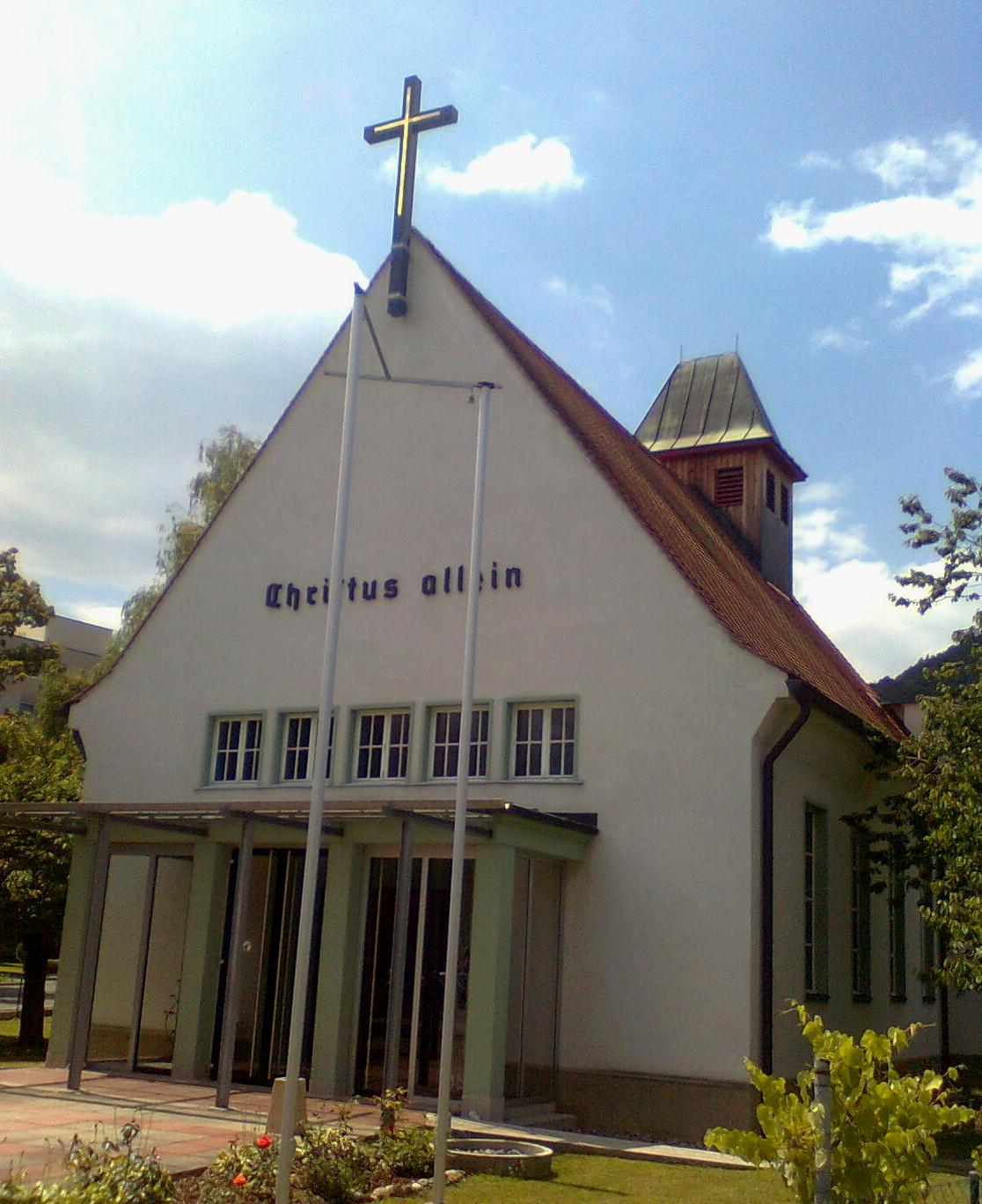 Evangelische Christuskirche in Graz, Eggenberg